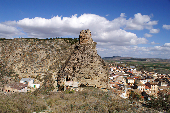 Vista de Falces (Navarra)